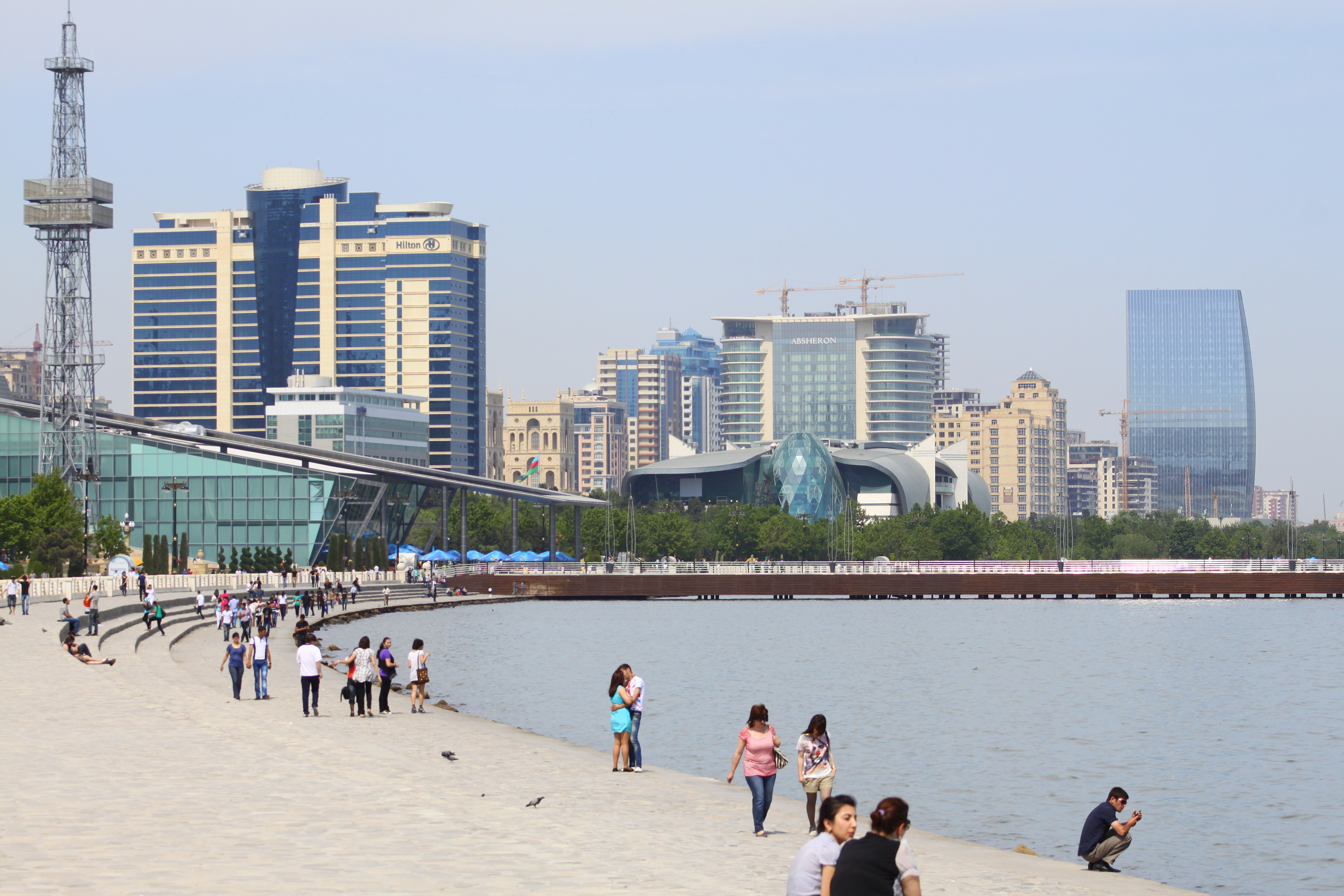 Бакинский приморский парк